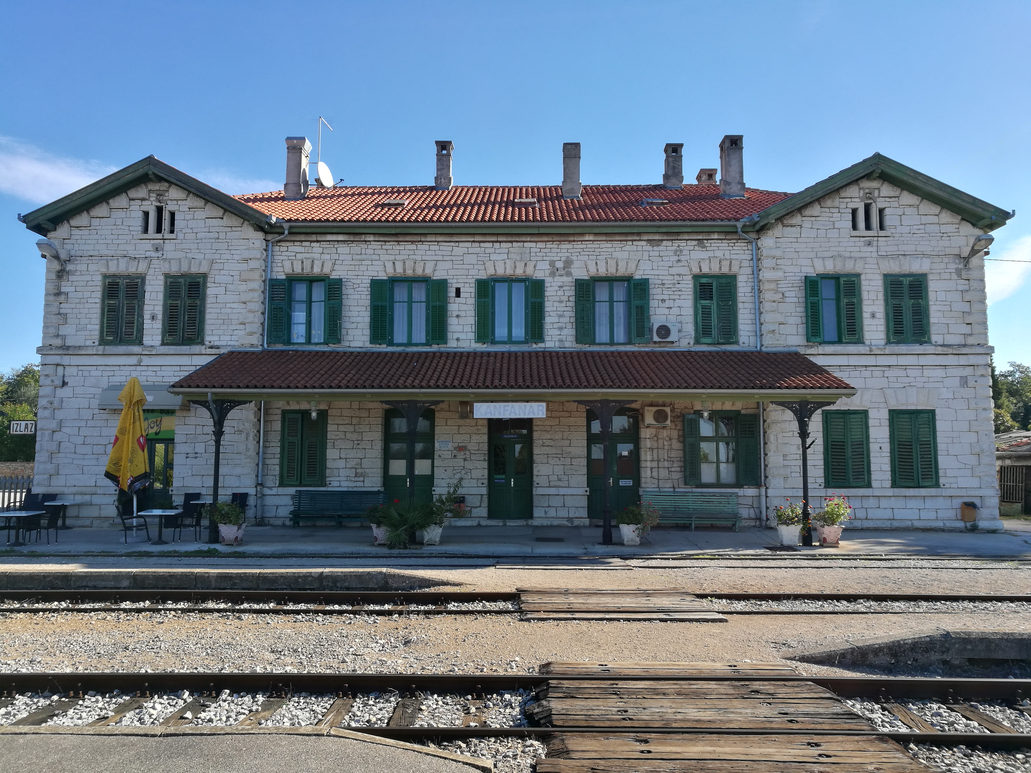 Kroatien (HR) - Gespanschaft Istrien (036) - Kanfanar: Bahnhof